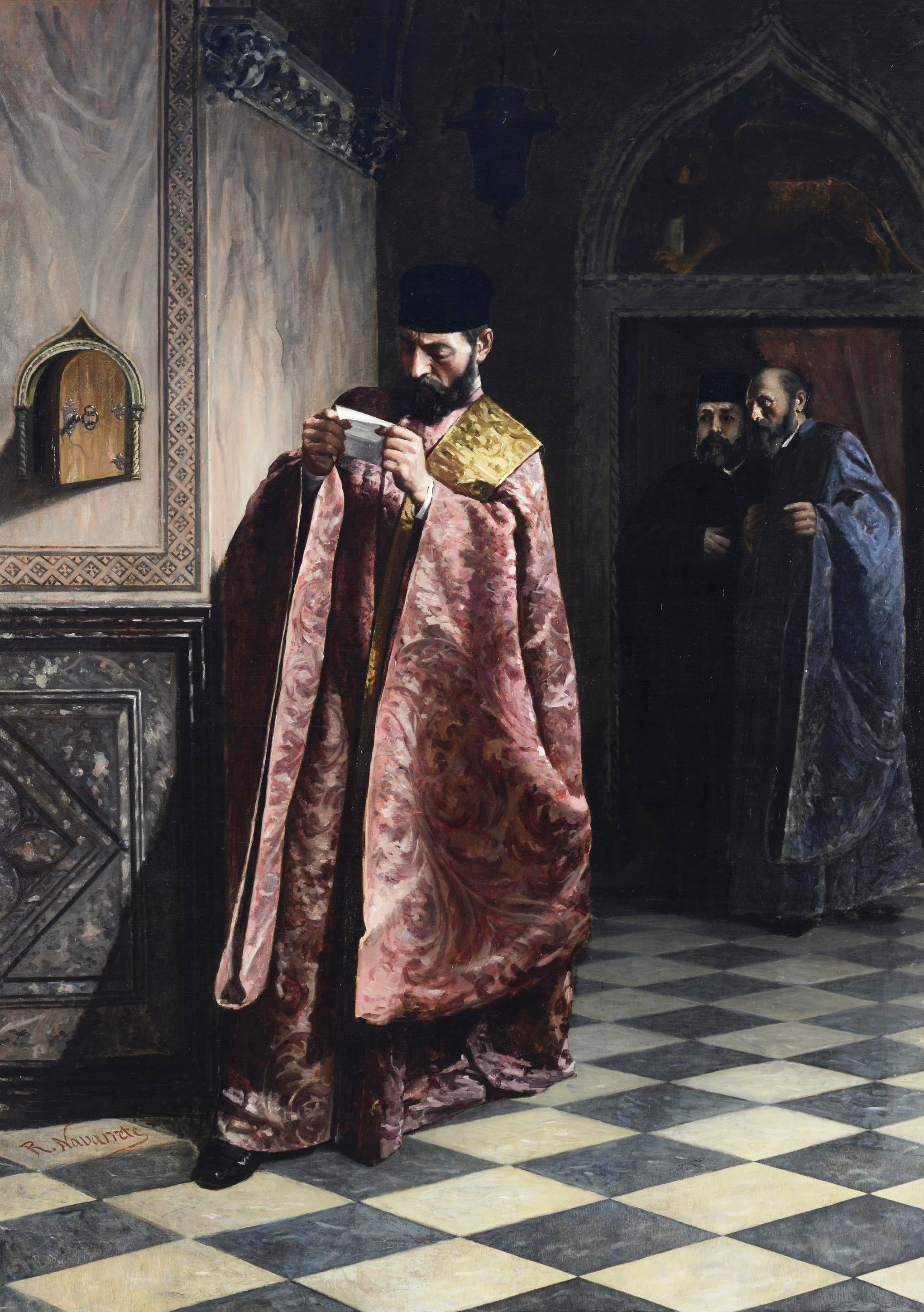 La obra representa probablemente un pasaje de la vida del dux de Venecia Francesco Foscari (1373-1457), ya que sus enemigos le hicieron creer que su hijo, que había sido desterrado a la isla de Creta, había muerto.